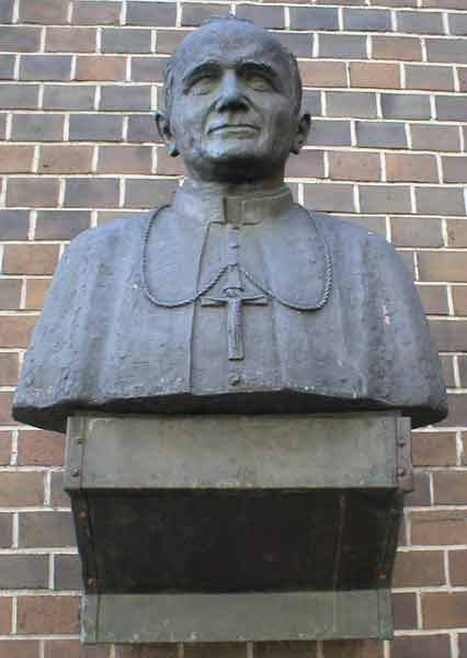 Popiersie Bogdany Ligęzy - Drwal, odlane dla Czarnej Białostockiej, od 1996 roku powielane i rozpowszechniane bez jej zgody - tu popiersie znajdujące się na ścianie frontowej kościoła garnizonowego w Katowicach.